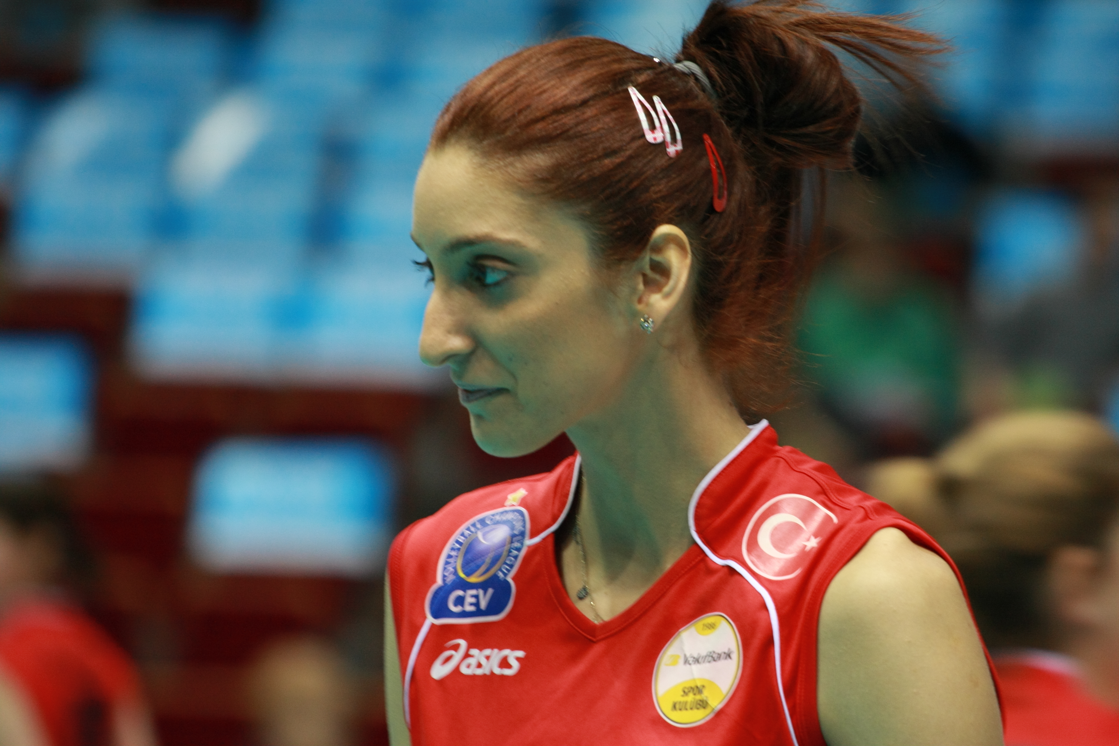 Polen Uslupehlivan